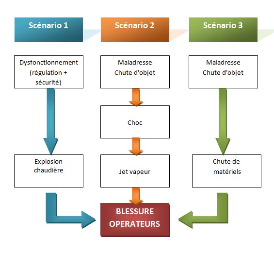 Exemple d'arbre logique d'explosion de chaudière